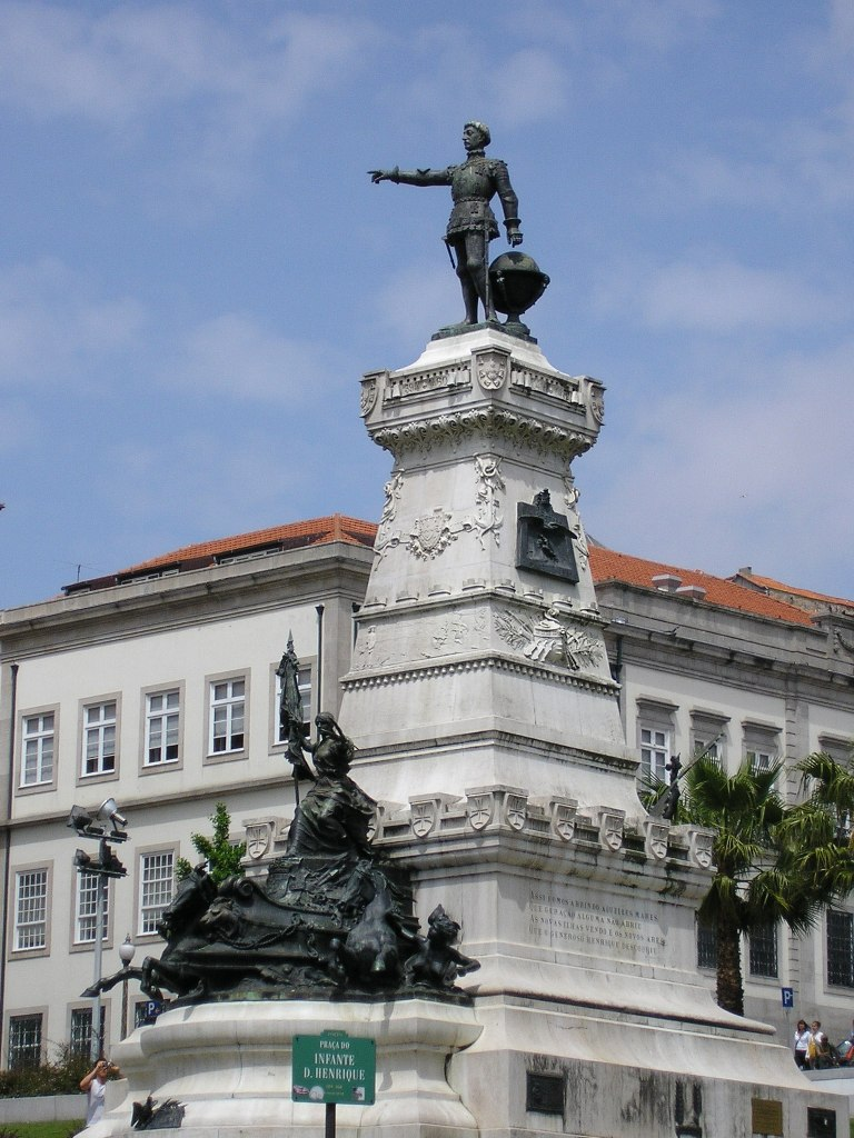 "Praça do Infante D. Henrique" in Porto, Portugal